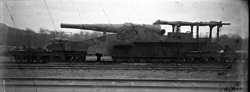 Vue d'ensemble d'un canon de calibre 320 chargé sur une plate-forme dans une gare entre Missy-sur-Aisne et Condé-sur-Aisne (Aisne). 1918. Guerre 1914-1918.